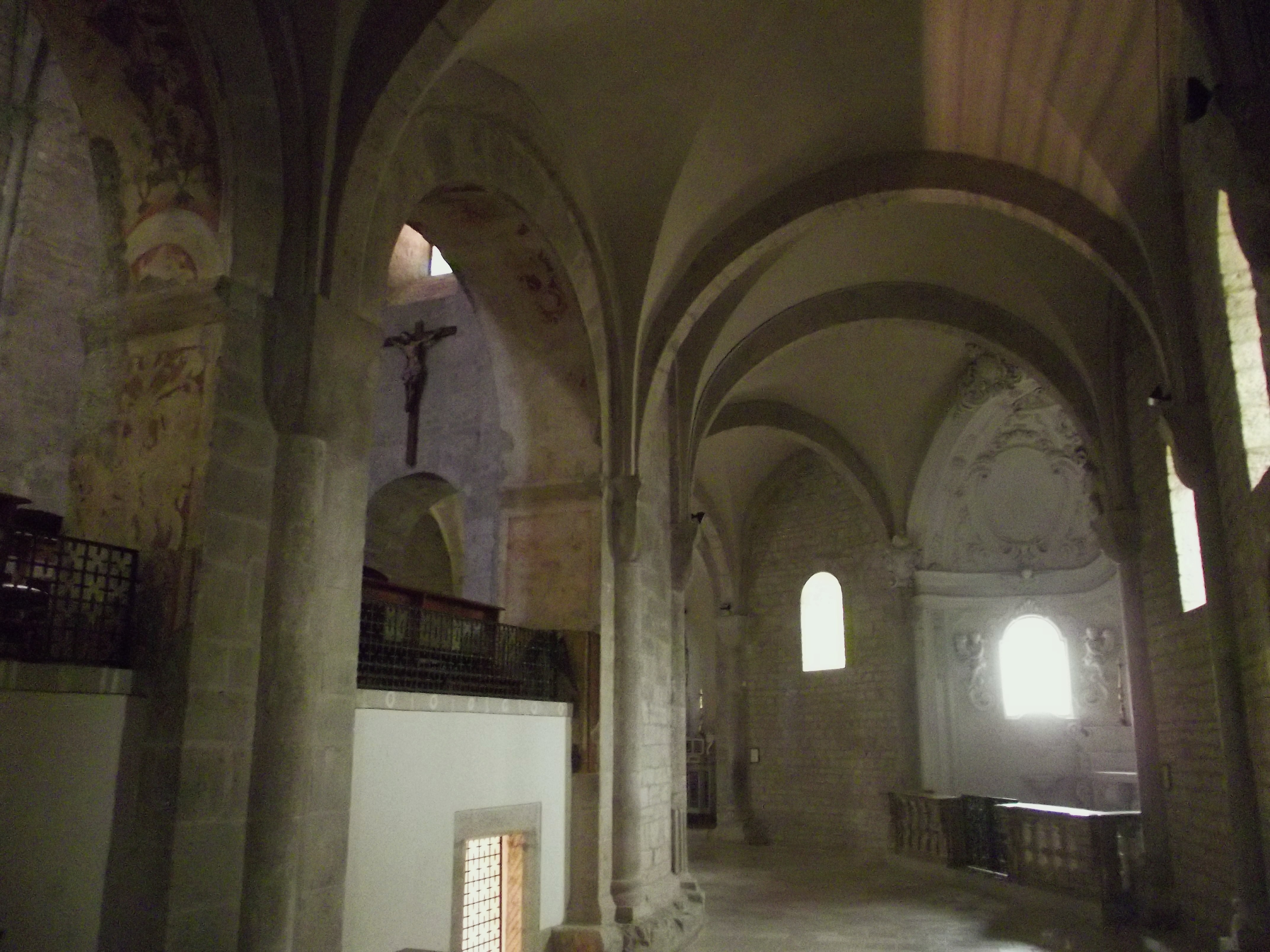 interno della Cattedrale il deambulatorio